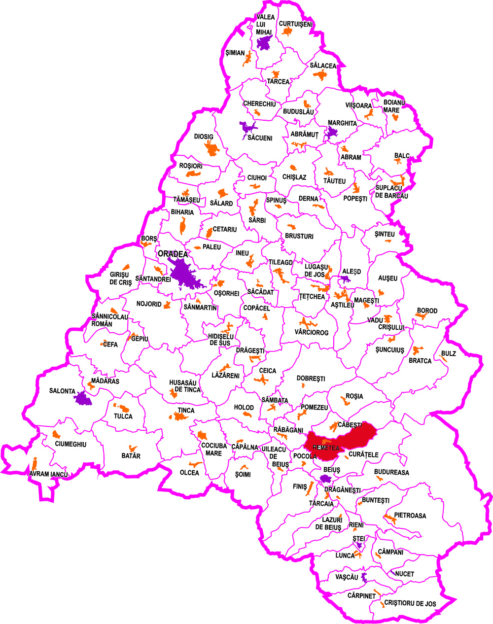 Ovi D. Pop /